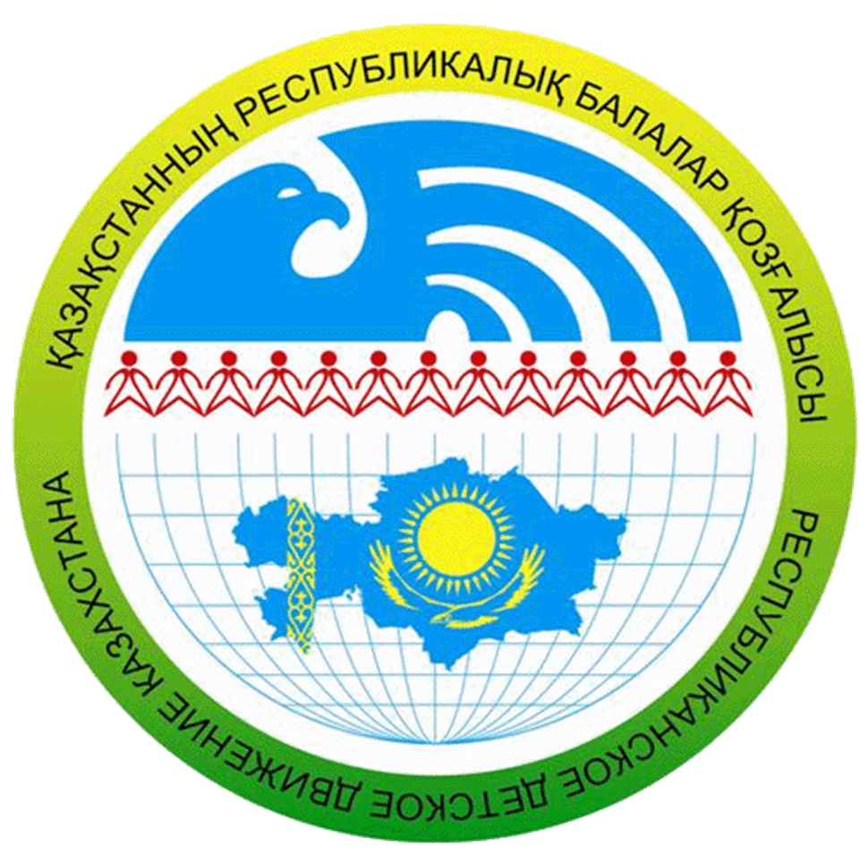 Жас ұлан